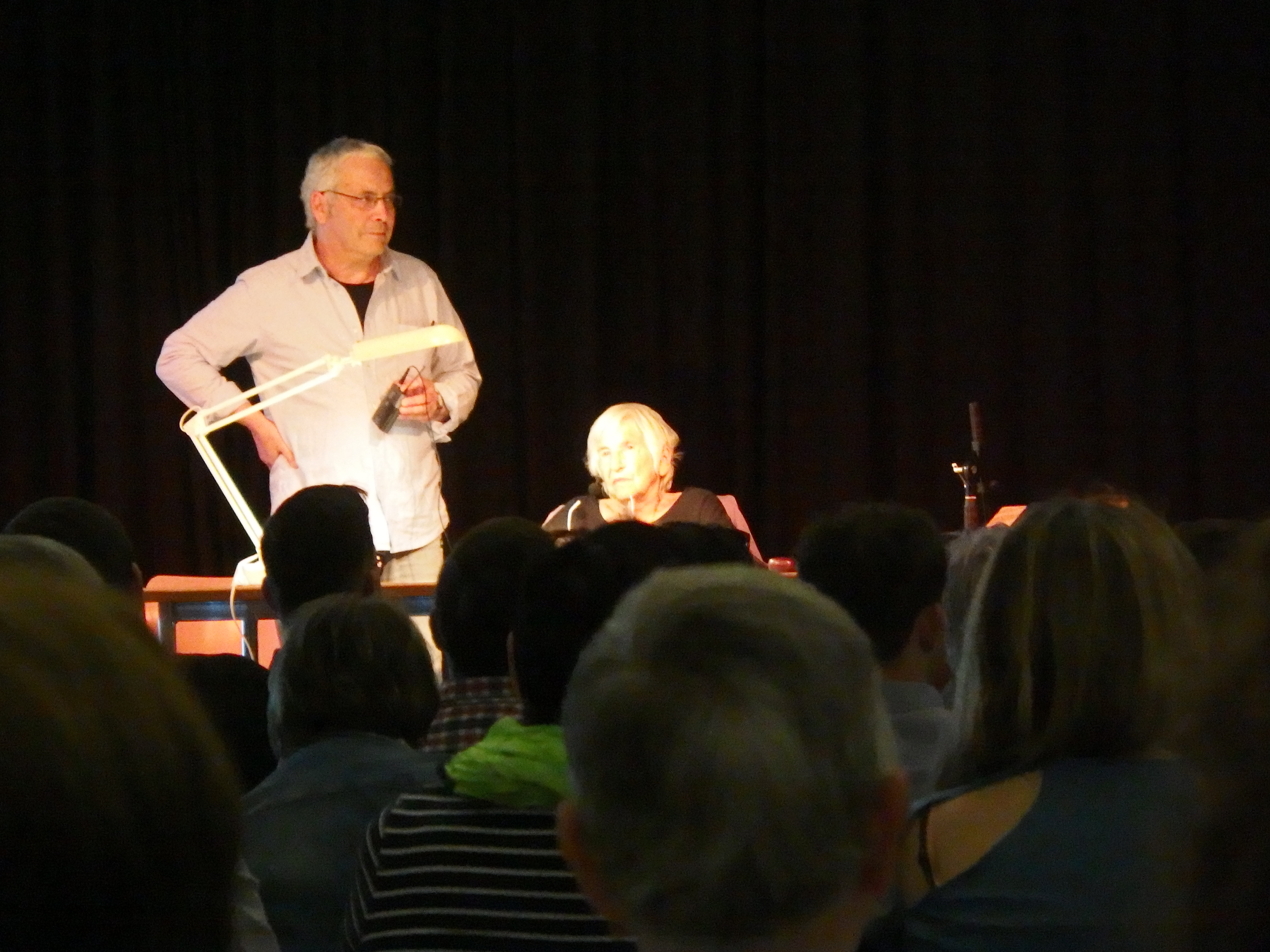 Esther Bejarano und Microphone Mafia im Bildungszentrum Kirkel Joram Bejarano und Esther Bejarano